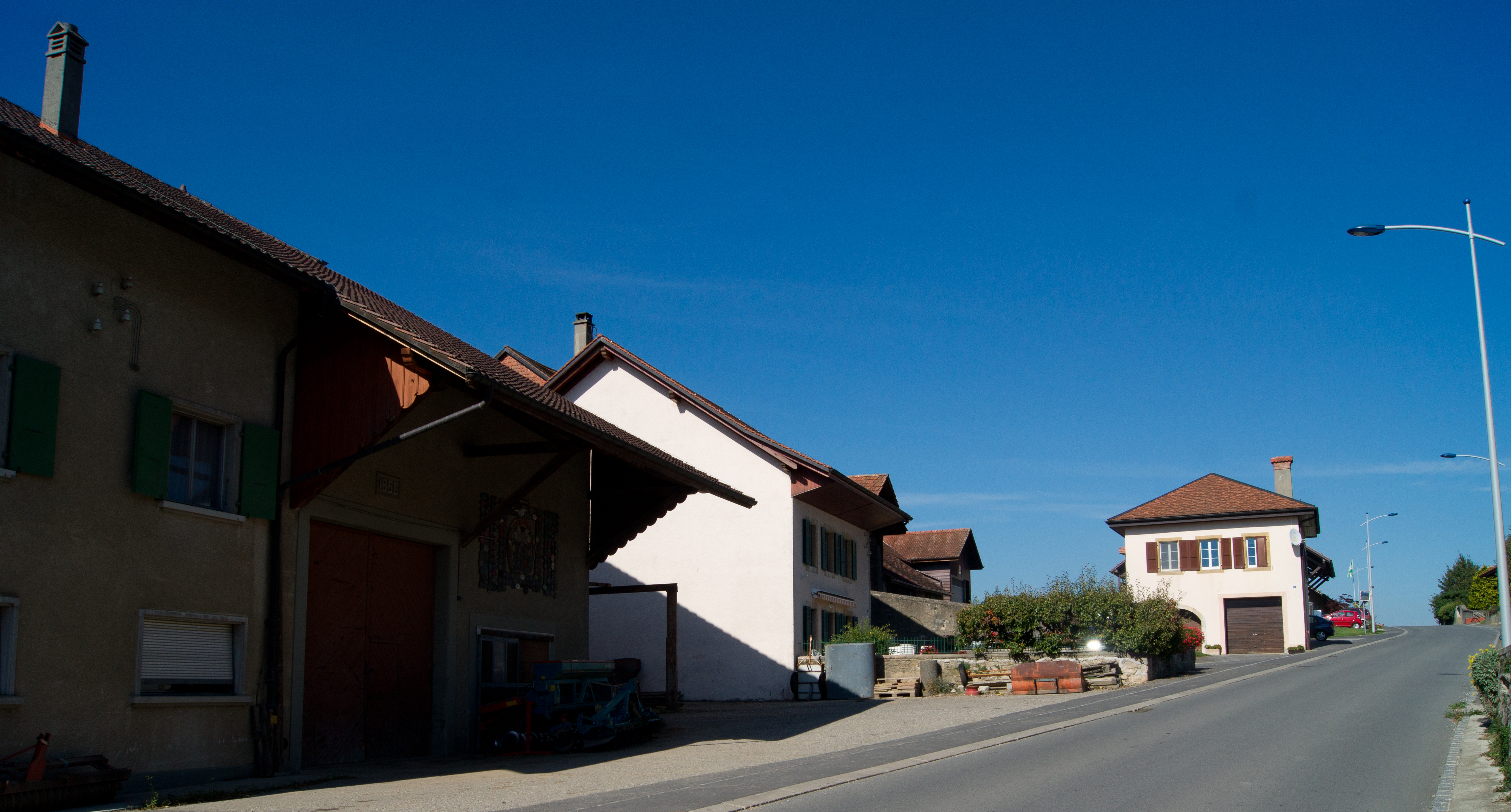 rue principale d'Eclagnens, canton de Vaud, Suisse.